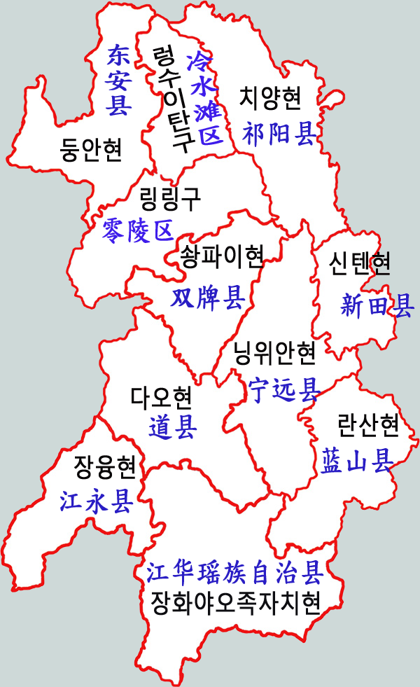 융저우 현급구역도